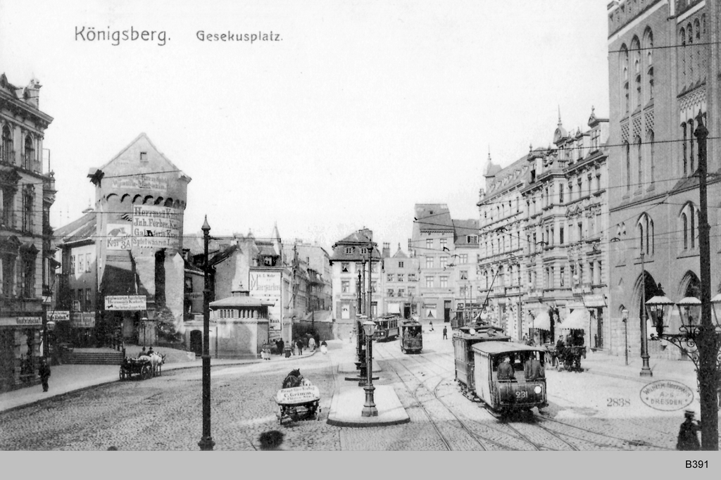 Königsberg